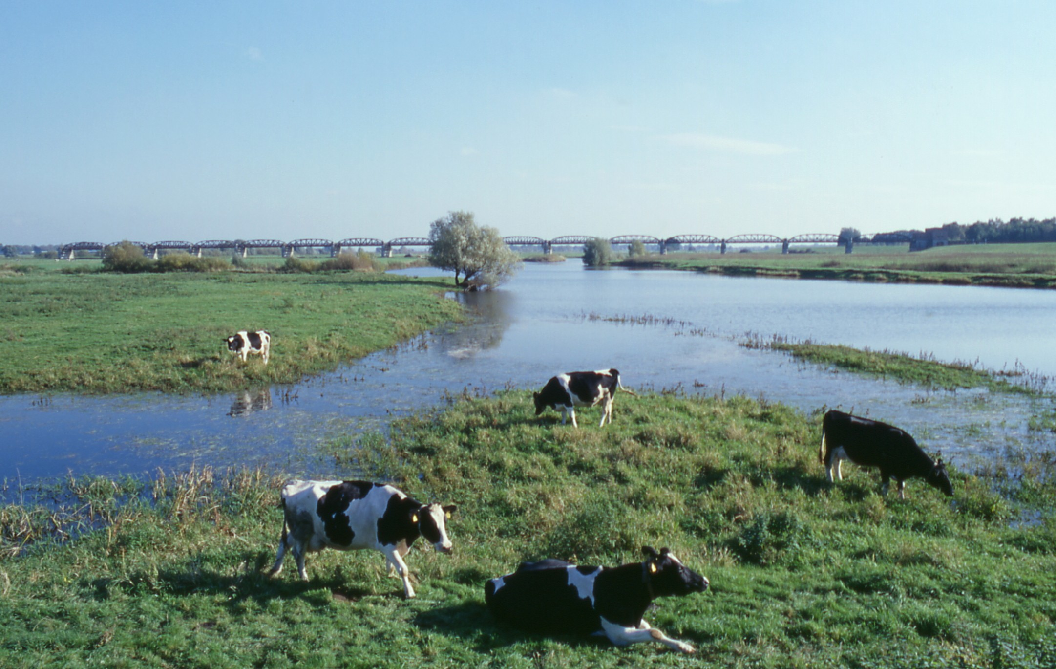 Überstaute Flutrinne im Deichvorland der mittleren Elbe, Nordost-Niedersachsen (Deutschland). Im Hintergrund die alte Dömitzer Eisenbahnbrücke.